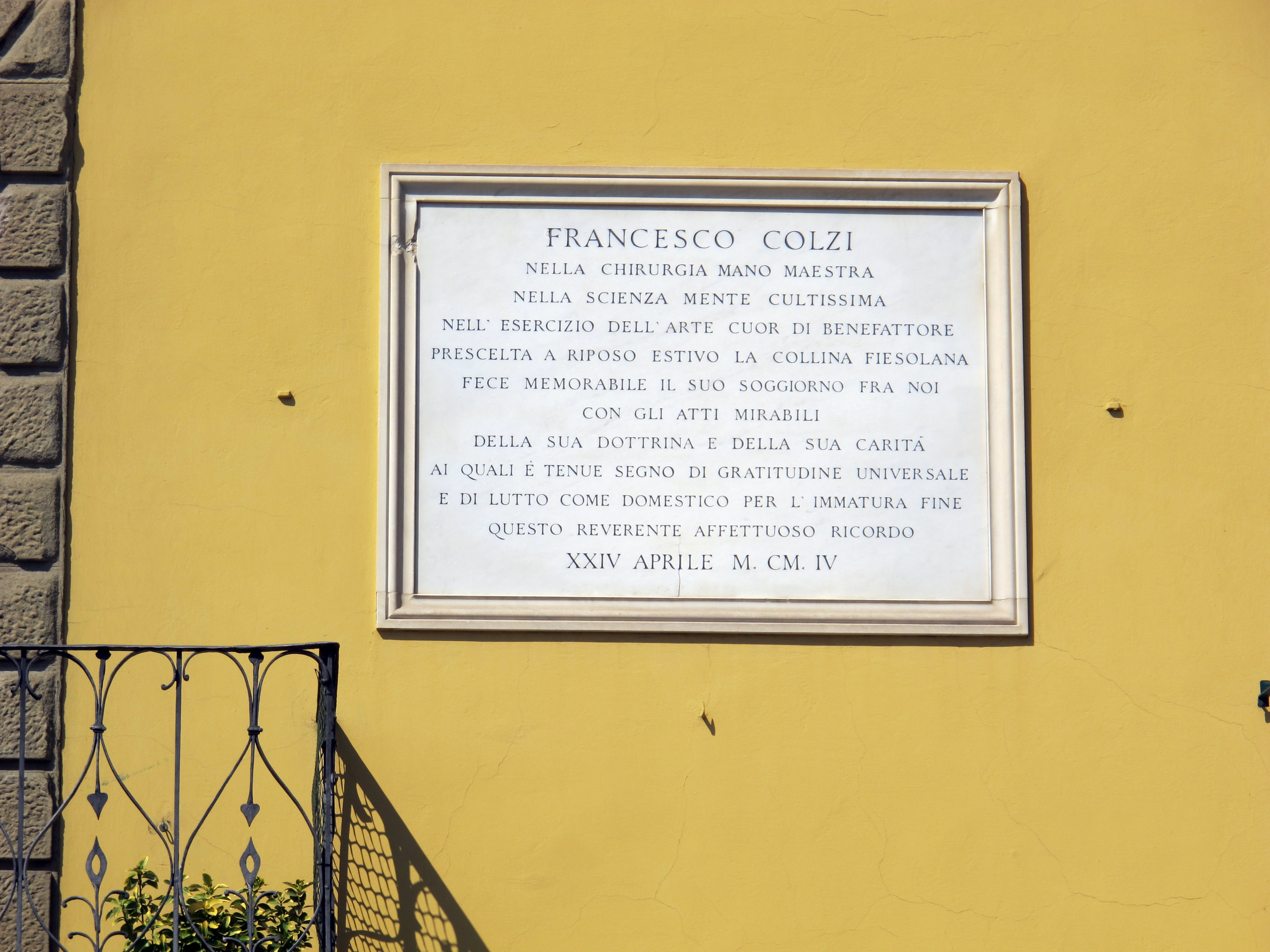 Fiesole, casa con targhe 03 francesco colzi